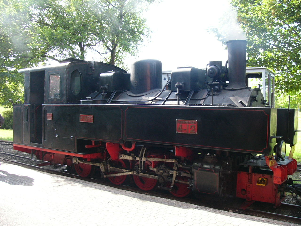 Locomotive 040T Franco-Belge au bois de Bellébat